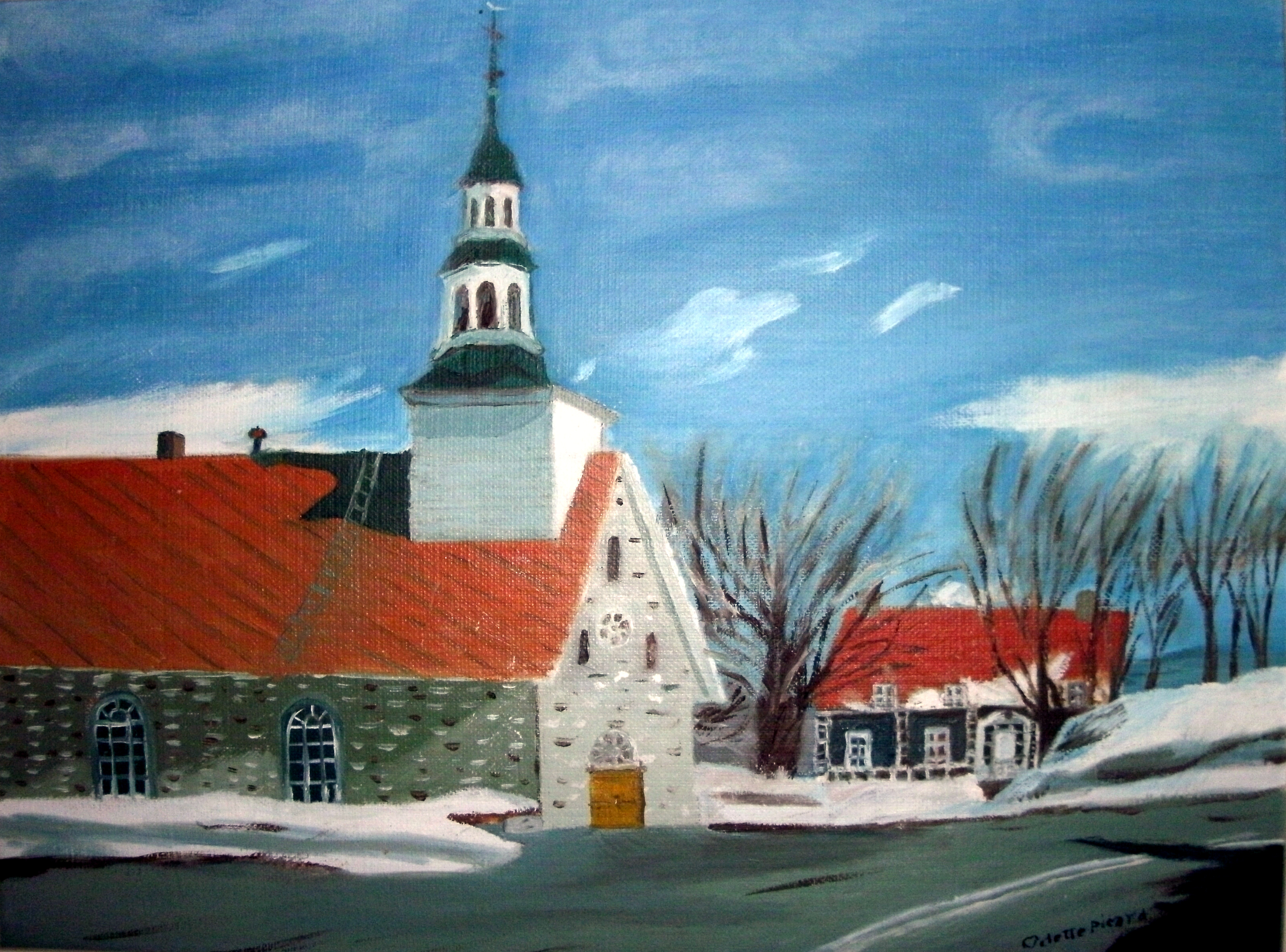 La petite église historique de Saint-François-de-l' île-d' Orléans juste avant l'incendie de 1988, croquée par Odette Picard artiste-peintre. À droite: le vieux presbytère resté intact.